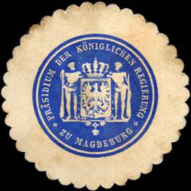 Sealing stamp Title: Präsidium der Königlichen Regierung zu Magdeburg Description: blau, weiß, geprägt Place: Magdeburg size: 5 cm